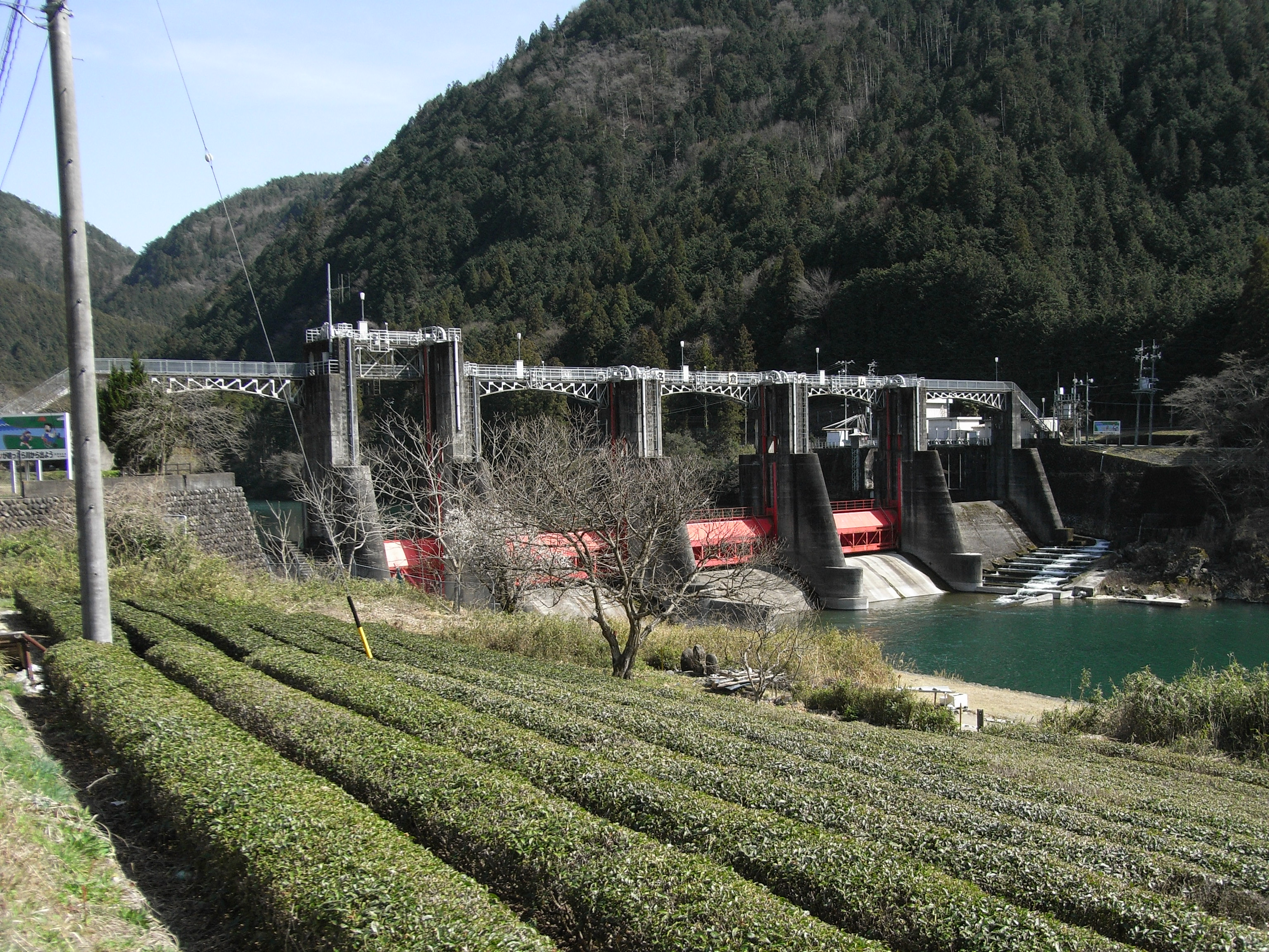 Dam